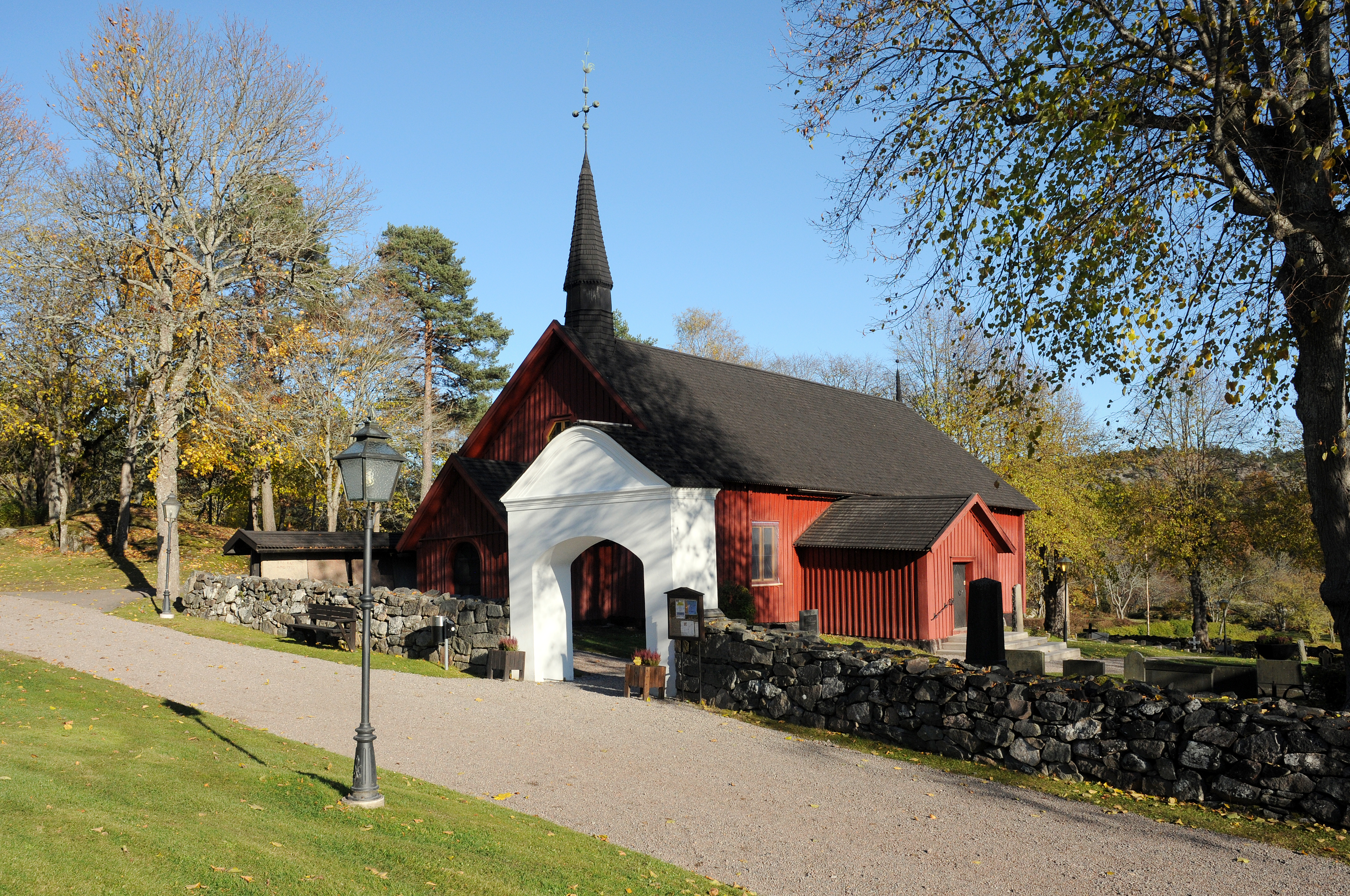 Tunabergs kyrka i Nyköpings kommun